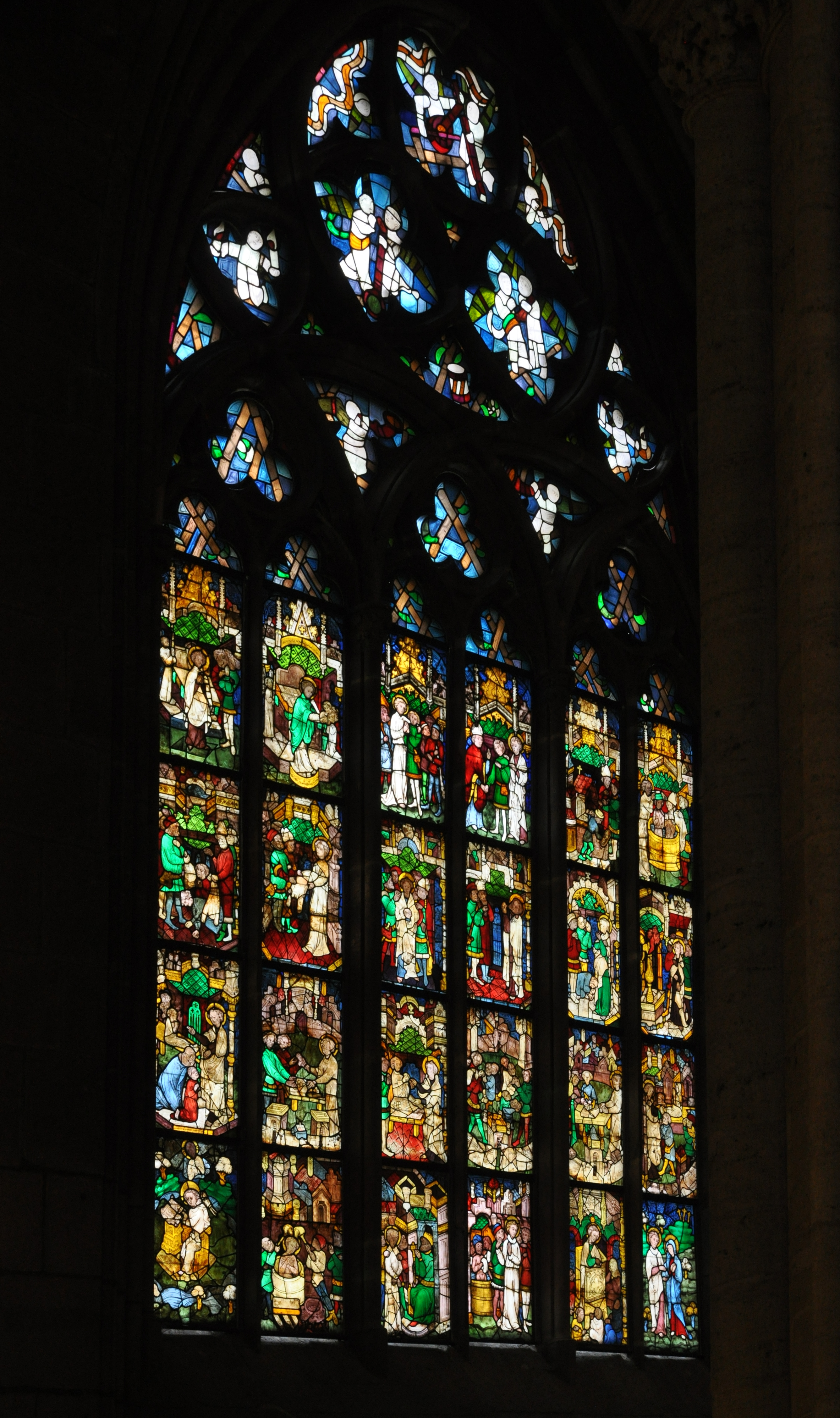 Fenster im südlichen Chorumgang des Halberstädter Doms